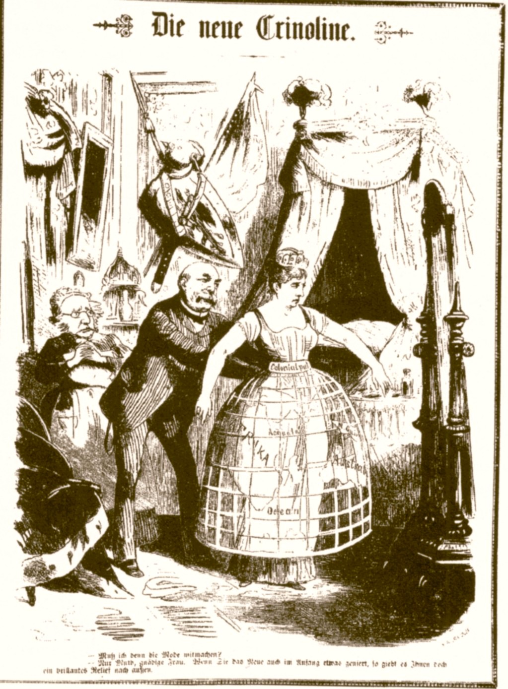 "Die neue Crinoline" Karikatur zu Bismarcks Kolonialpolitik (Holzschnitt von Gustav Heil für Satirezeitschrift "Berliner Wespen" vom 13. März 1885